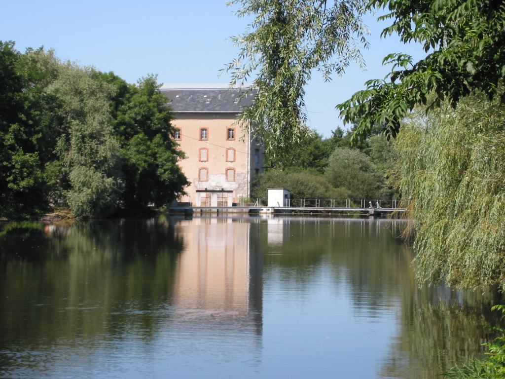 Jaligny-sur Besbre (France) - Le moulin de la Chaume et le barrage sur la Besbre